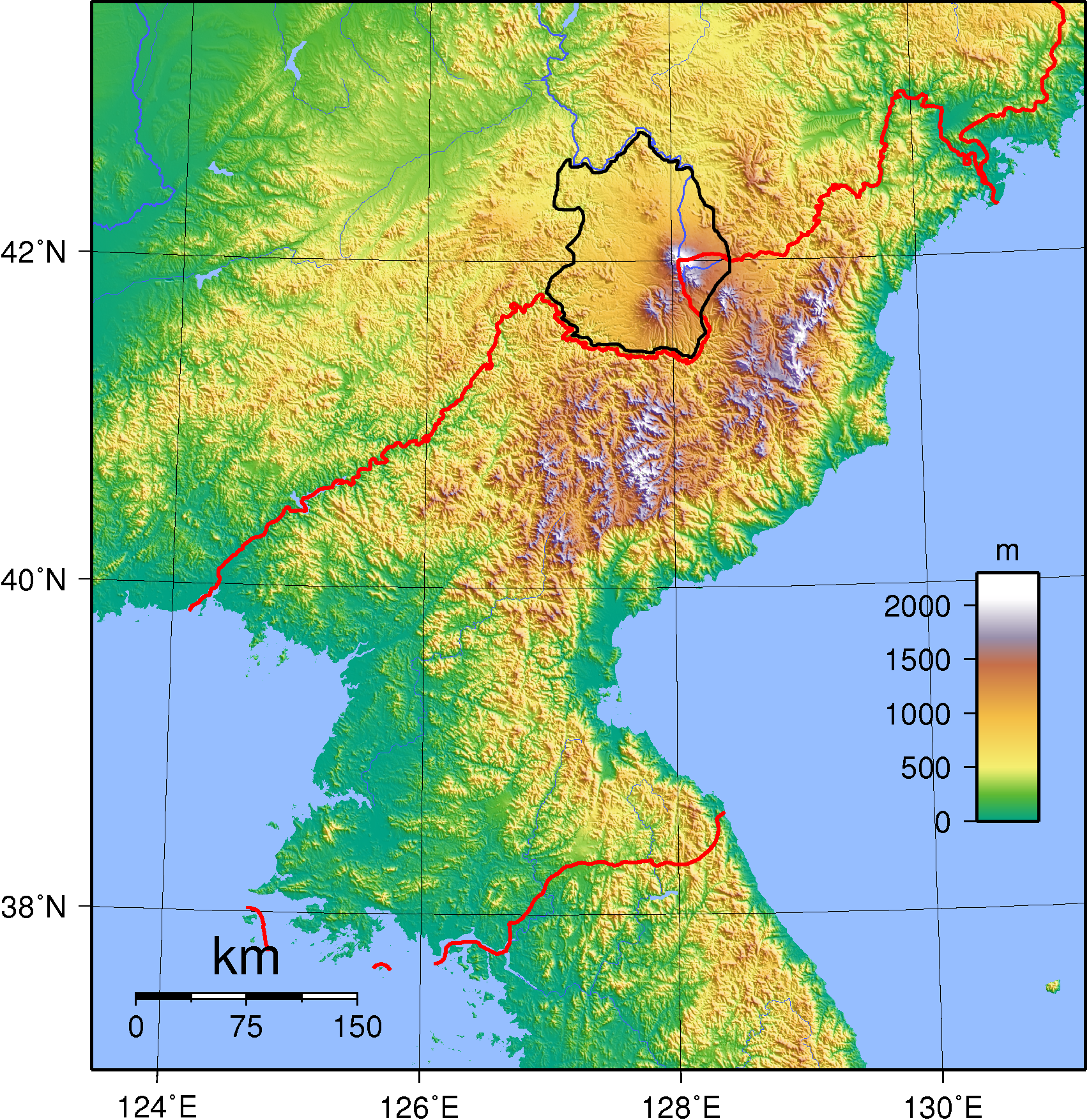 Carte de localisation du massif du Chagbai